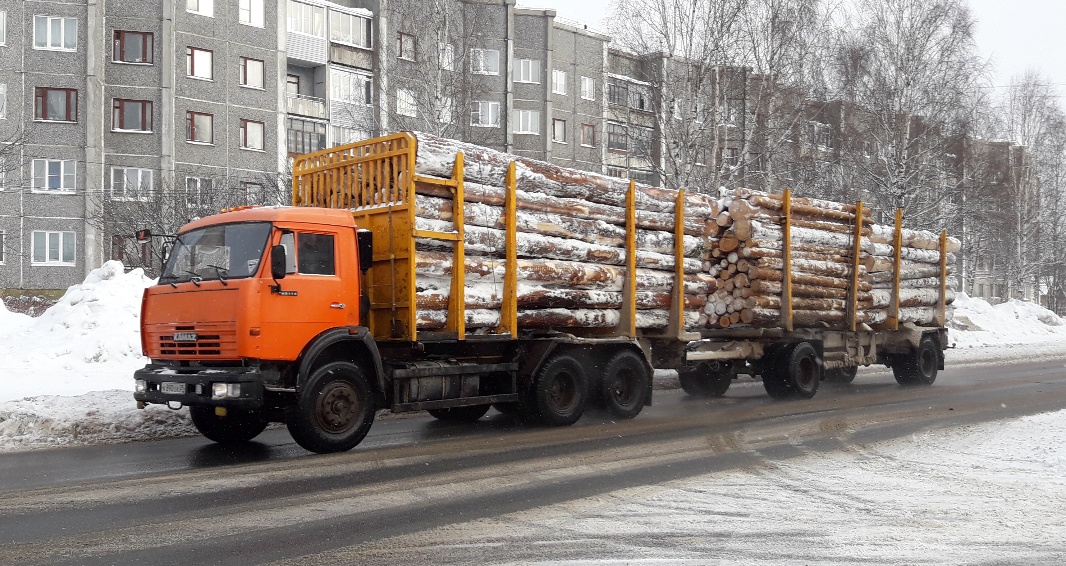 Лесовозный поезд с безрезой